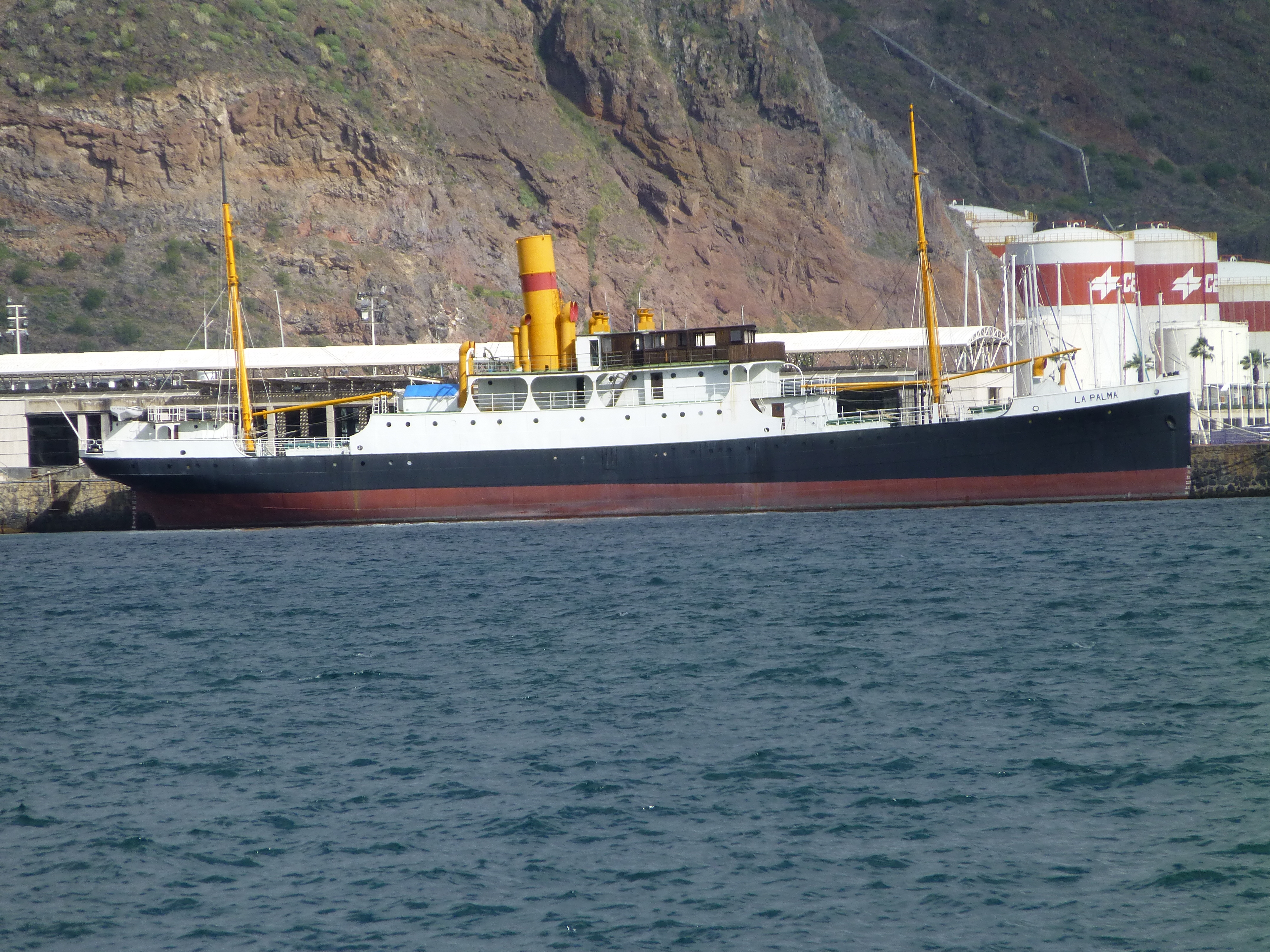 En el Muelle Norte del puerto de Santa Cruz de Tenerife se conserva el "correíllo" LA PALMA; un centenario buque de vapor, destinado originalmente al servicio interinsular de las Islas Canarias (España). El vapor LA PALMA perteneció a la "Compañía de Vapores Correos Interinsulares Canarios" (1912-1930) y a la "Compañía Trasmediterránea" (1930-1976).